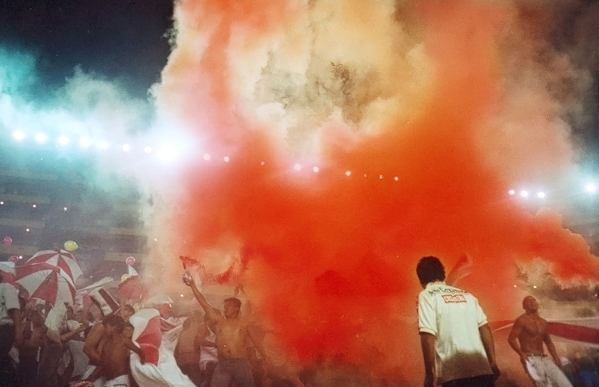 Barra Oriente del Club Universitario de Deportes del Perú. License on Flickr (2011-03-01): CC-BY-SA-2.0 Flickr tags: Paulo, Photoshop, CS3, PauloVicente, Lima, Perú, Peru, Peruvian